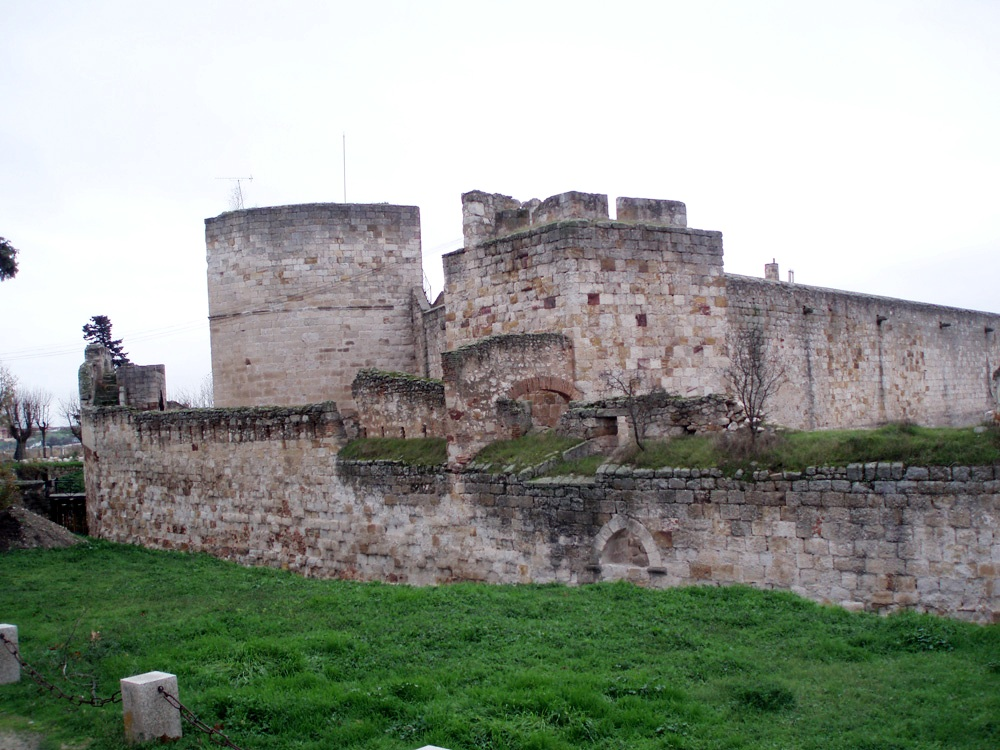 Castillo de Zamora en 2006